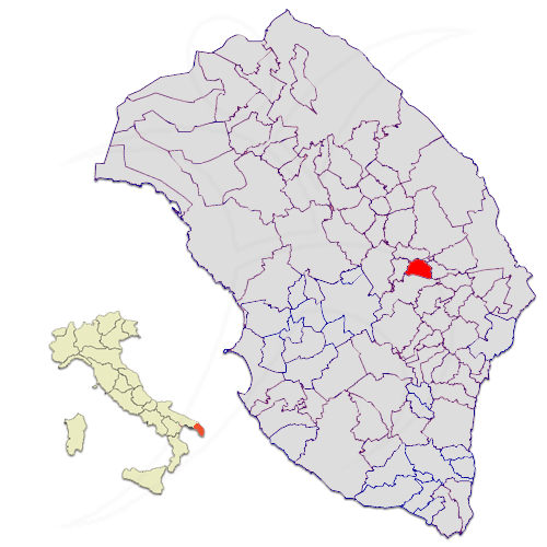 Il territorio del comune di Cursi nella provincia di Lecce